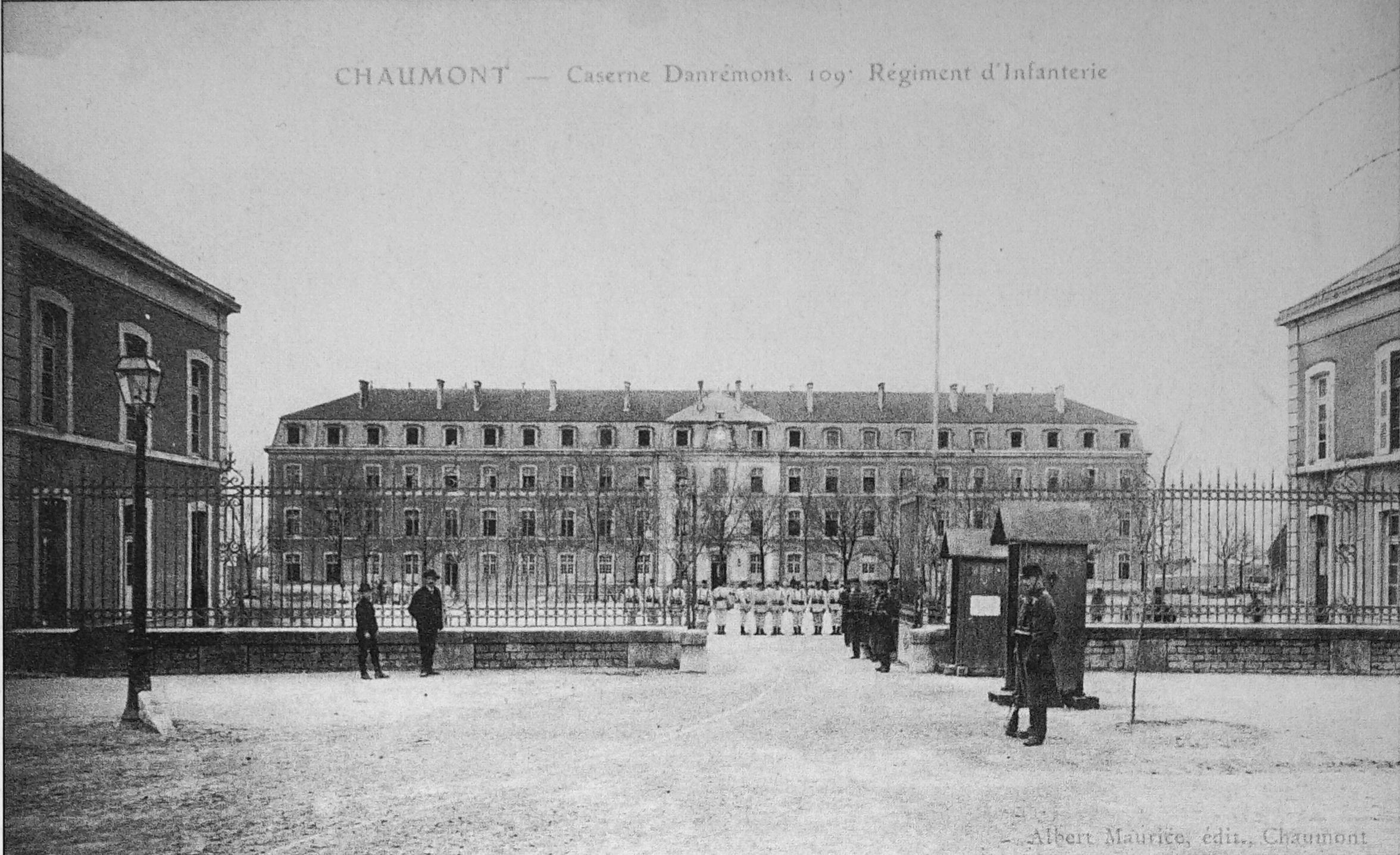 par une carte postale ancienne.